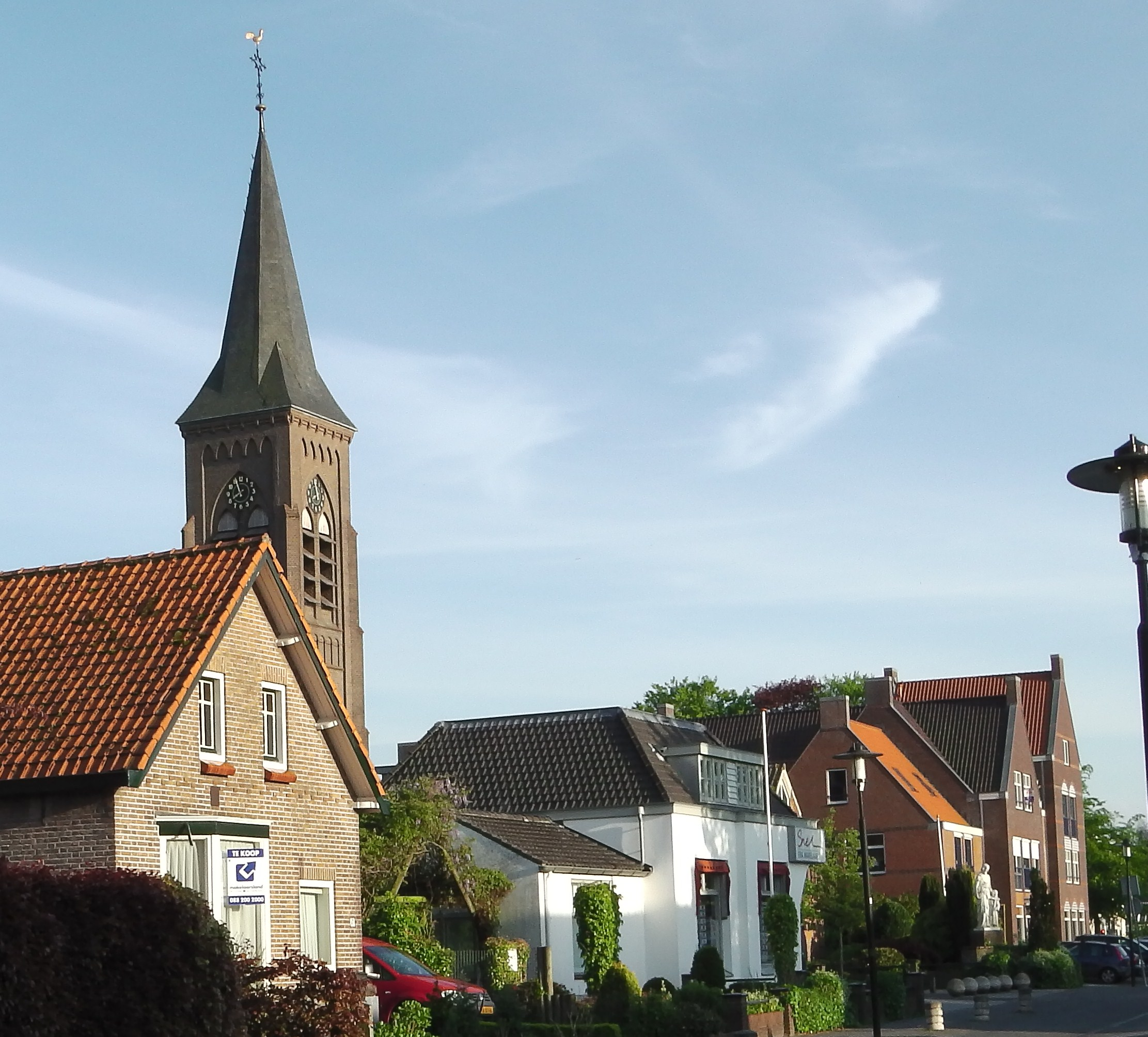 Oud gedeelte in de stad, met op de achtergrond de toren van de St. Josephkerk, gelegen aan de Hamersveldseweg.